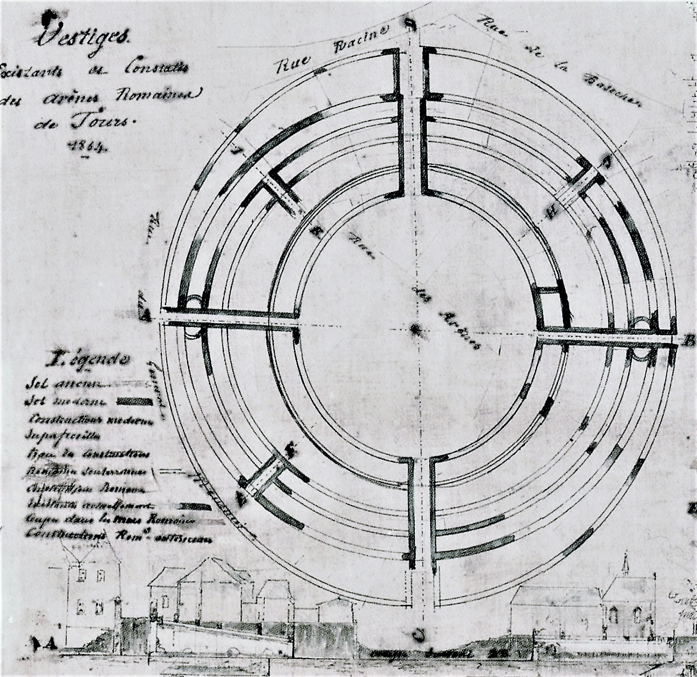 Plan de l'amphithéâtre de Tours d'après les fouilles de 1853